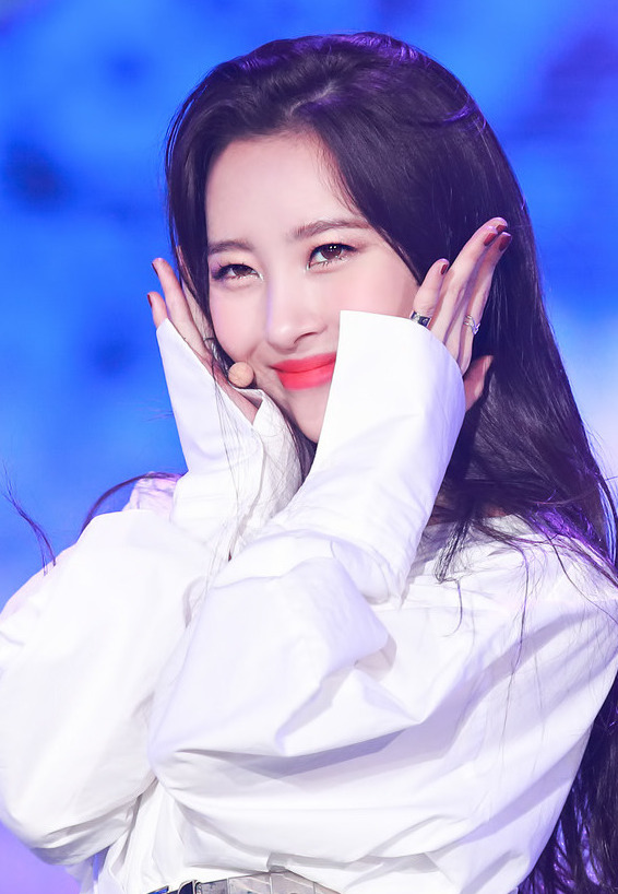 171001 코리아 뮤직 페스티벌 선미